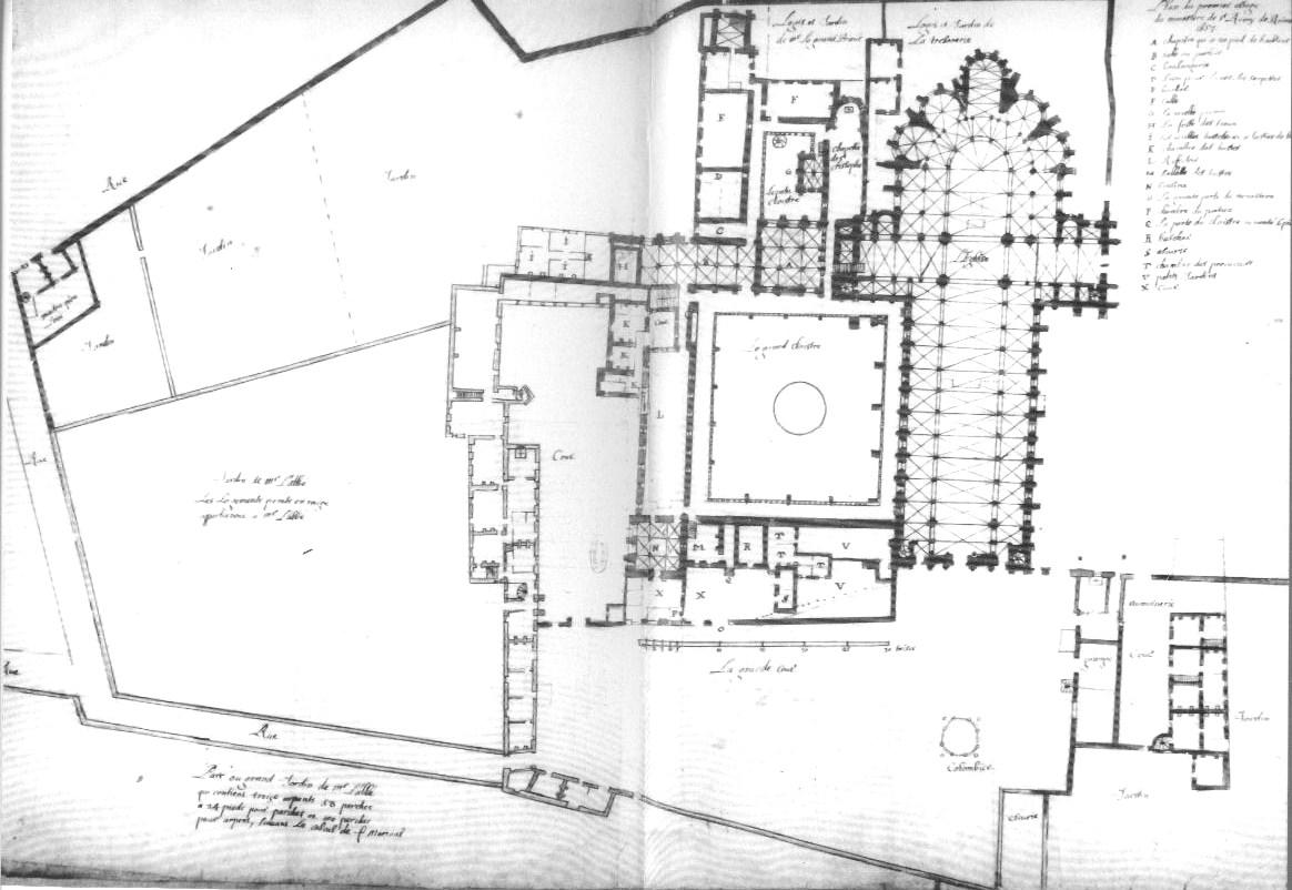 abbaye st-Remi présentation de son état en 1653.